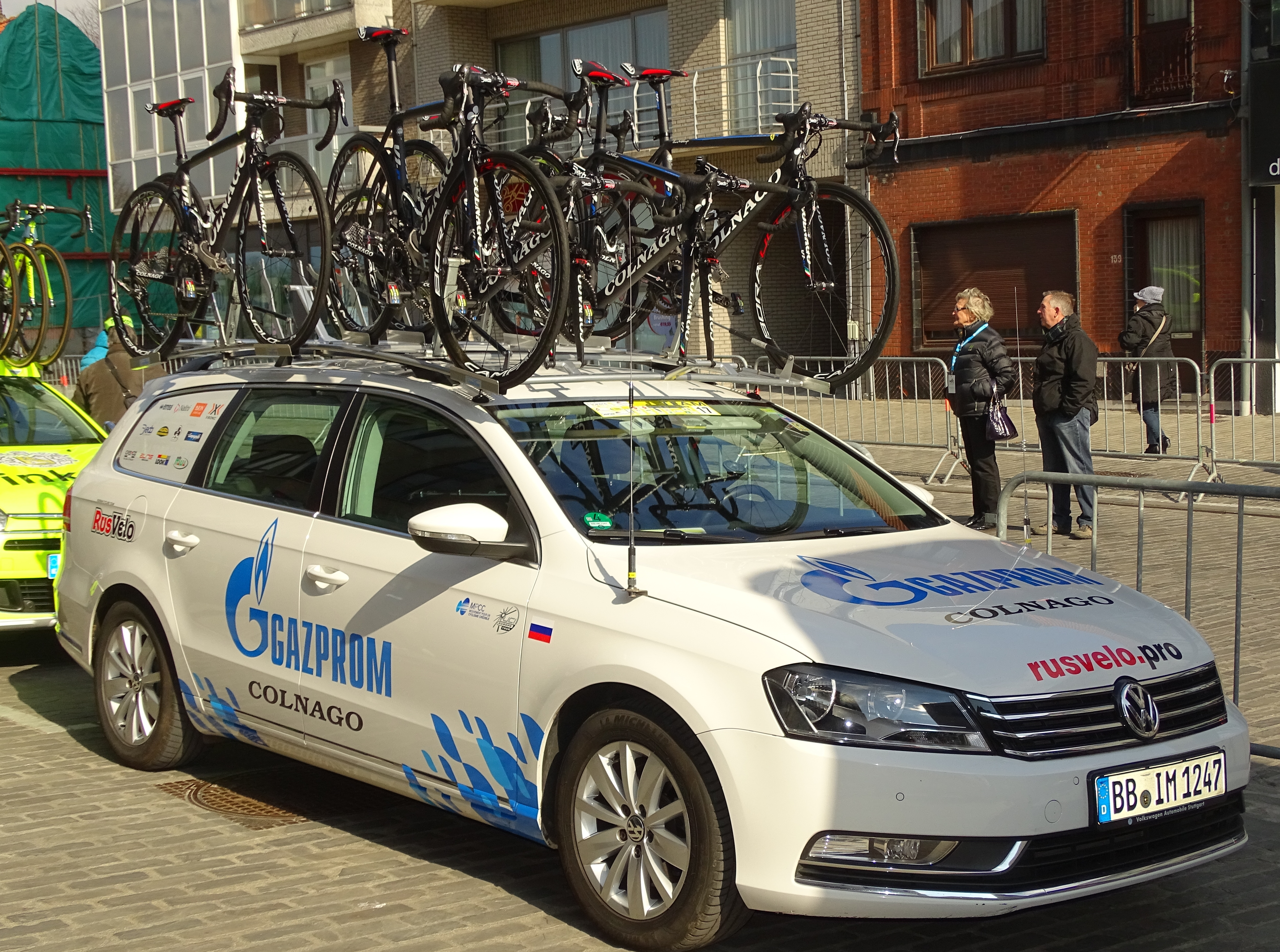 Reportage réalisé le mercredi 16 mars à l'occasion du départ de la Nokere Koerse 2016 à Deinze, Belgique.